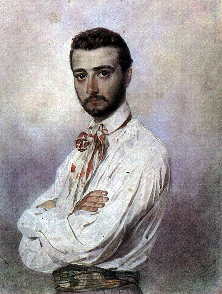 Portrait de Vincenzo Tittoni. 1850-1852.